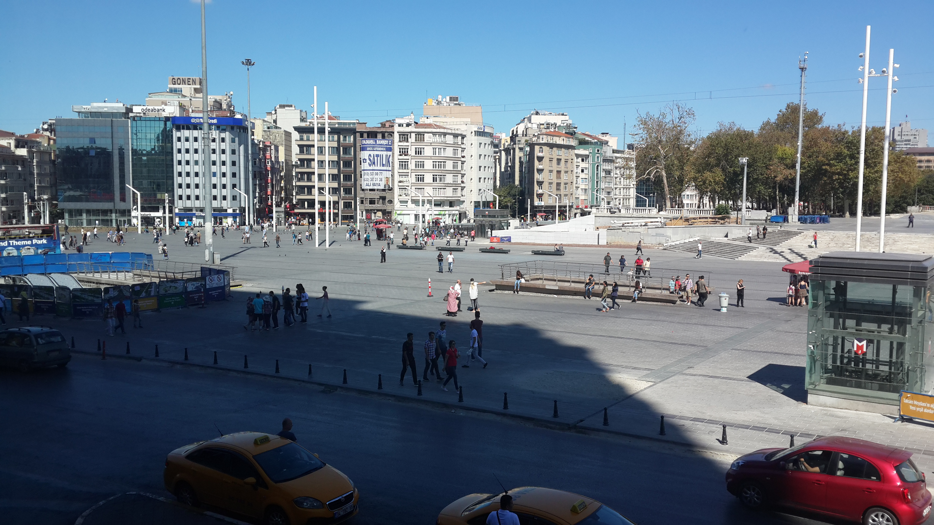 Yayalaştırma Projesi sonrası The Marmara Oteli'nden Taksim Meydanı Taksim Square after Pedestrianization Project